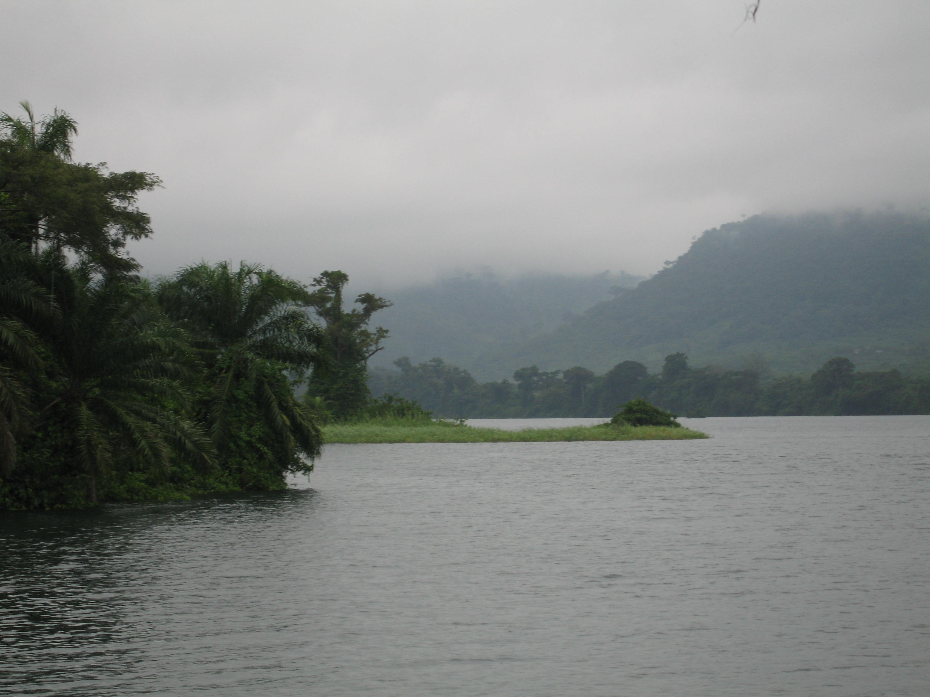 Lake Volta, Ghana